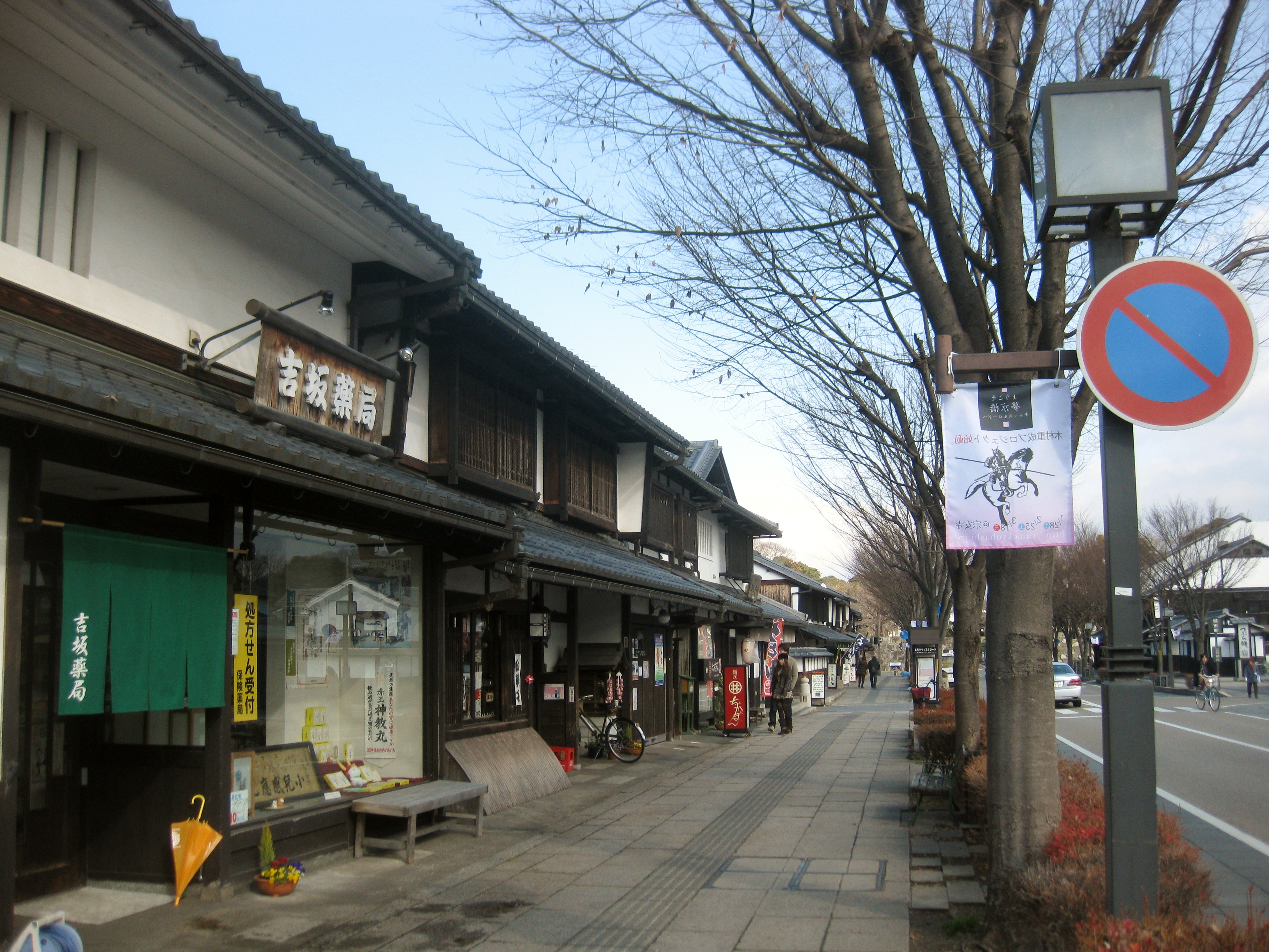 滋賀県彦根市の夢京橋キャッスルロード